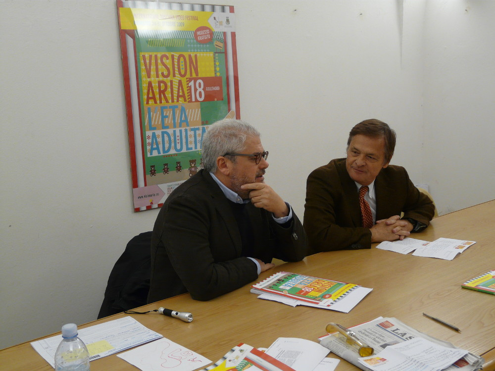 2009. Roberto Andò e Roberto Escobar nella giuria del festival